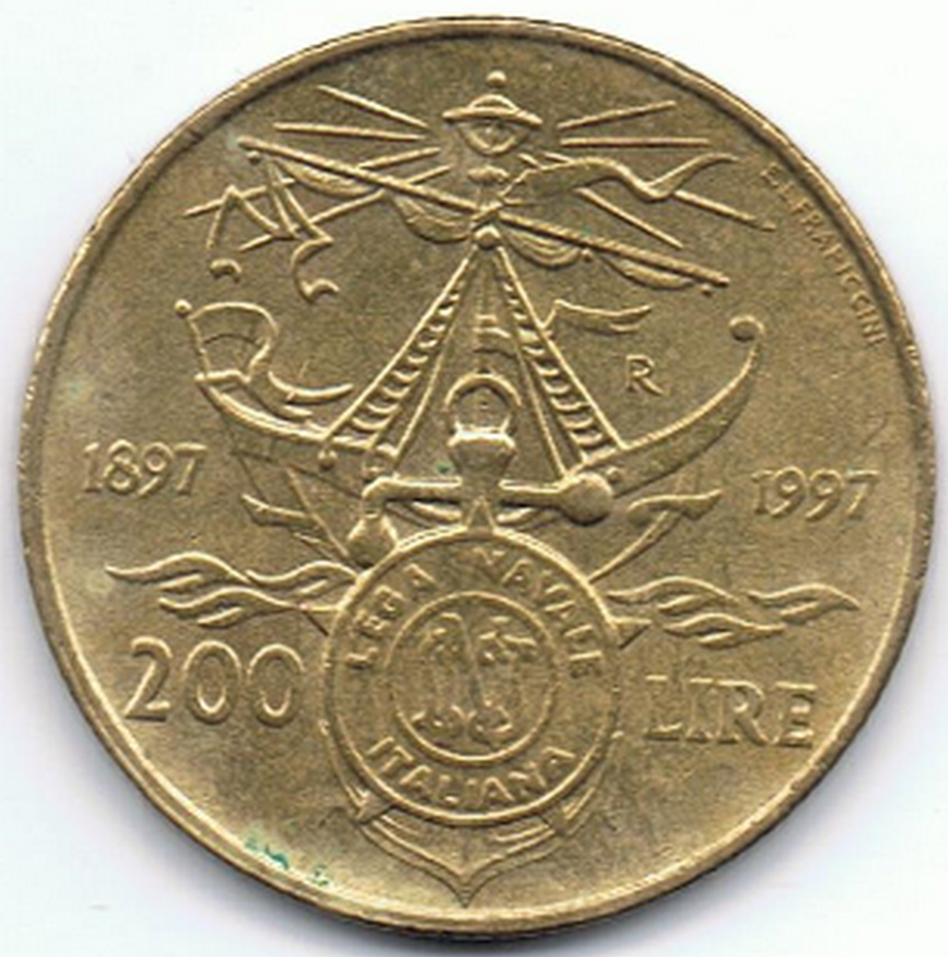 200 Lire Italiane - Centenario della Lega Navale Italiana - 1997